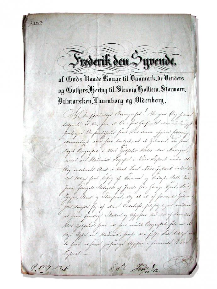 Den 1. december 1854 fik Hadsund sit handelsprivilegium.